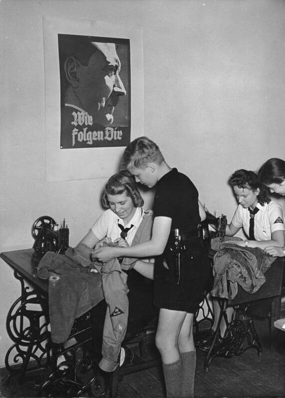 Berlin, Nähstube des BDM "Schont Kleider und Schuhe" - zum Aufruf der Reichsjugendführung. Vortext siehe J 2937 UBz: ein Blick in eine BDM-Nähstube in der Sachen des Jungvolks ausgebessert werden. Phot. Schwanke, 29.7.1942 [Berlin.- Bund Deutscher Mädel (BDM), Nähstube, Mädchen an Nähmaschinen sitzend, an der Wand Plakat mit Porträt Adolf Hitler und Text "Wir folgen Dir"]